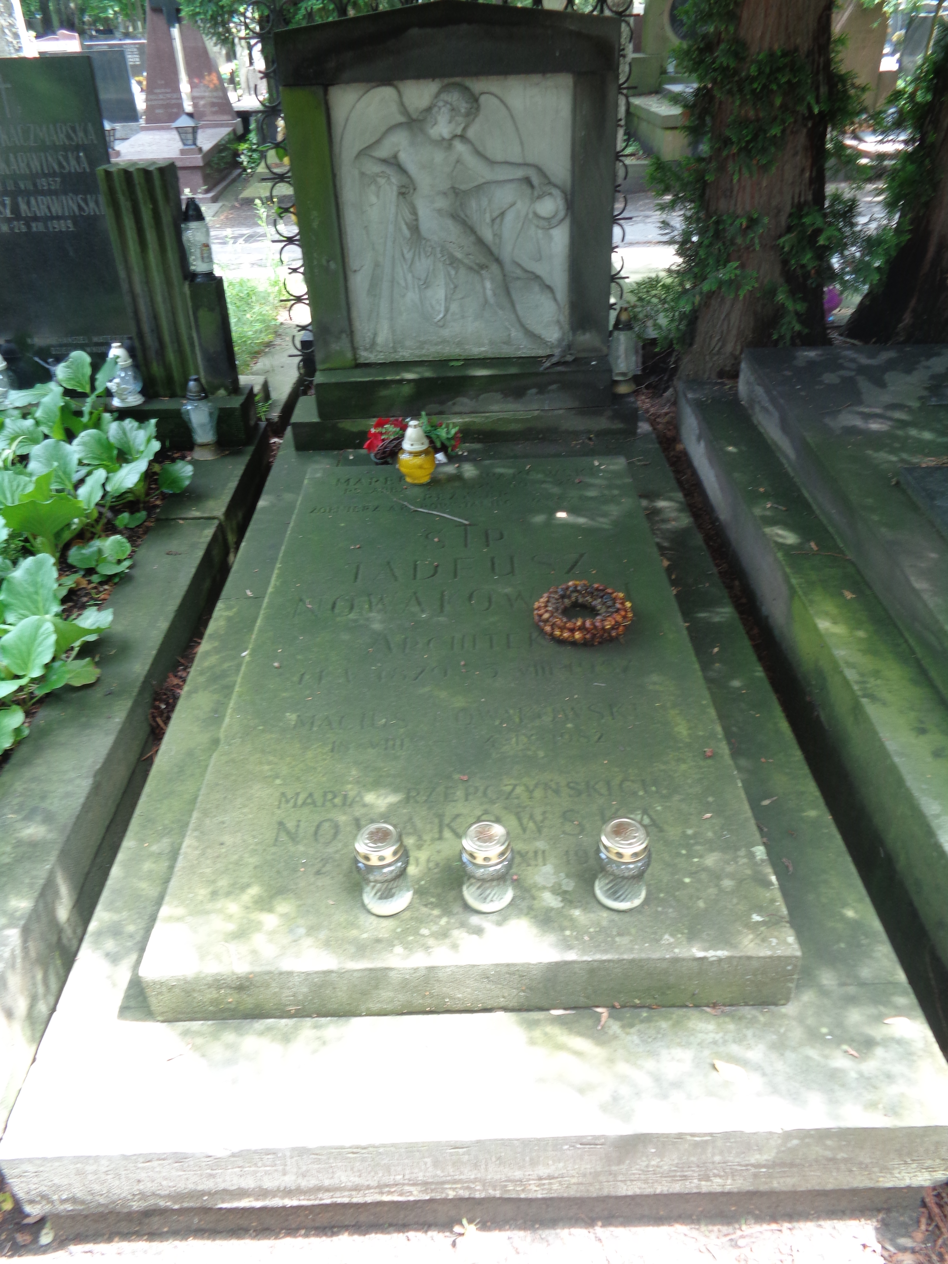 Grób architekta Tadeusza Nowakowskiego na Cmentarzu Powązkowskim